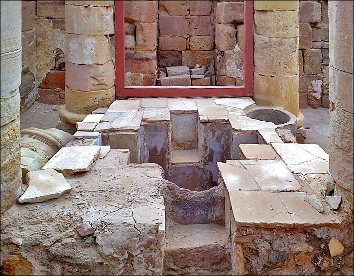 Les fonts baptismaux du baptistère de l’église byzantine de Pétra.